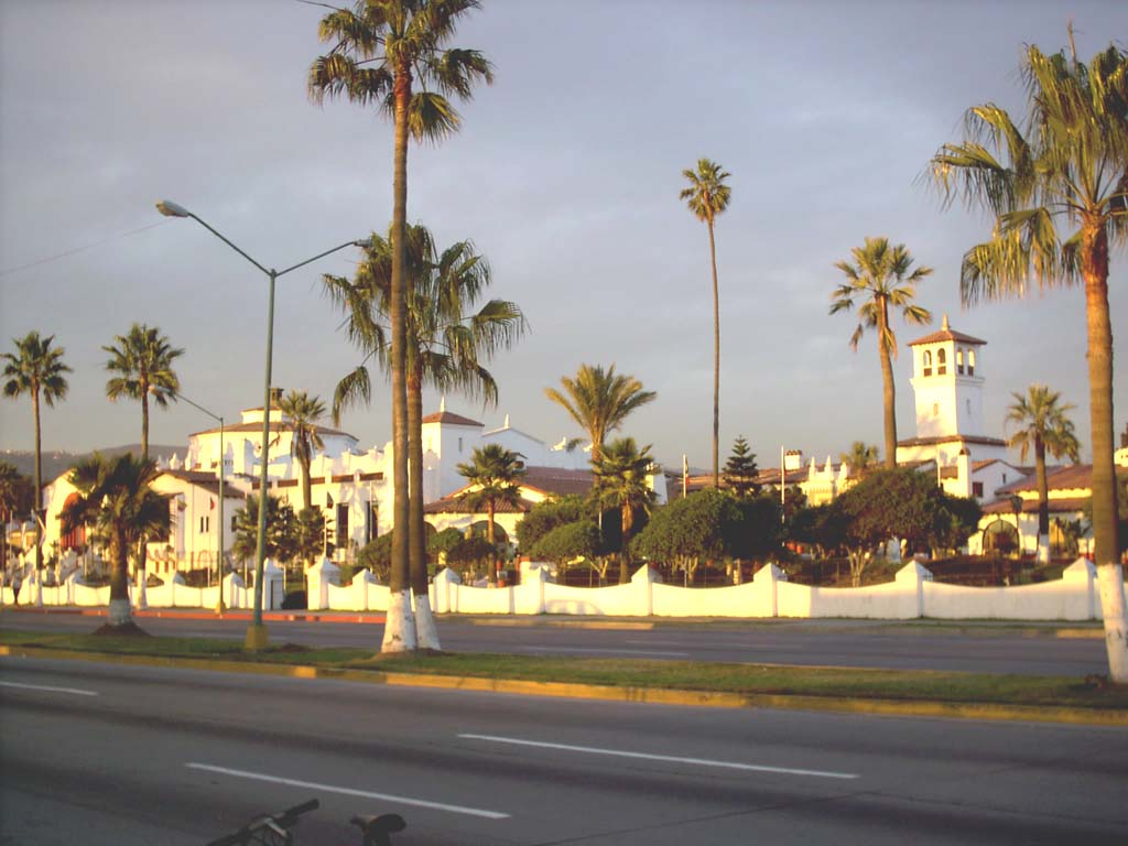 Ex Hotel Riviera Pacífico de Ensenada Hoy el Centro Cultural Cívico y de Convenciones Riviera del Pacífico Fue construido en 1929 como Hotel para los Estado Unidenses escapando la prohibición. De es::en:Image:RivieraPacificoW.jpg